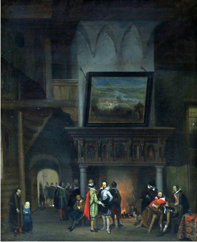 Interieur met Johan van Oldenbarnevelt, 49 x 39 cm